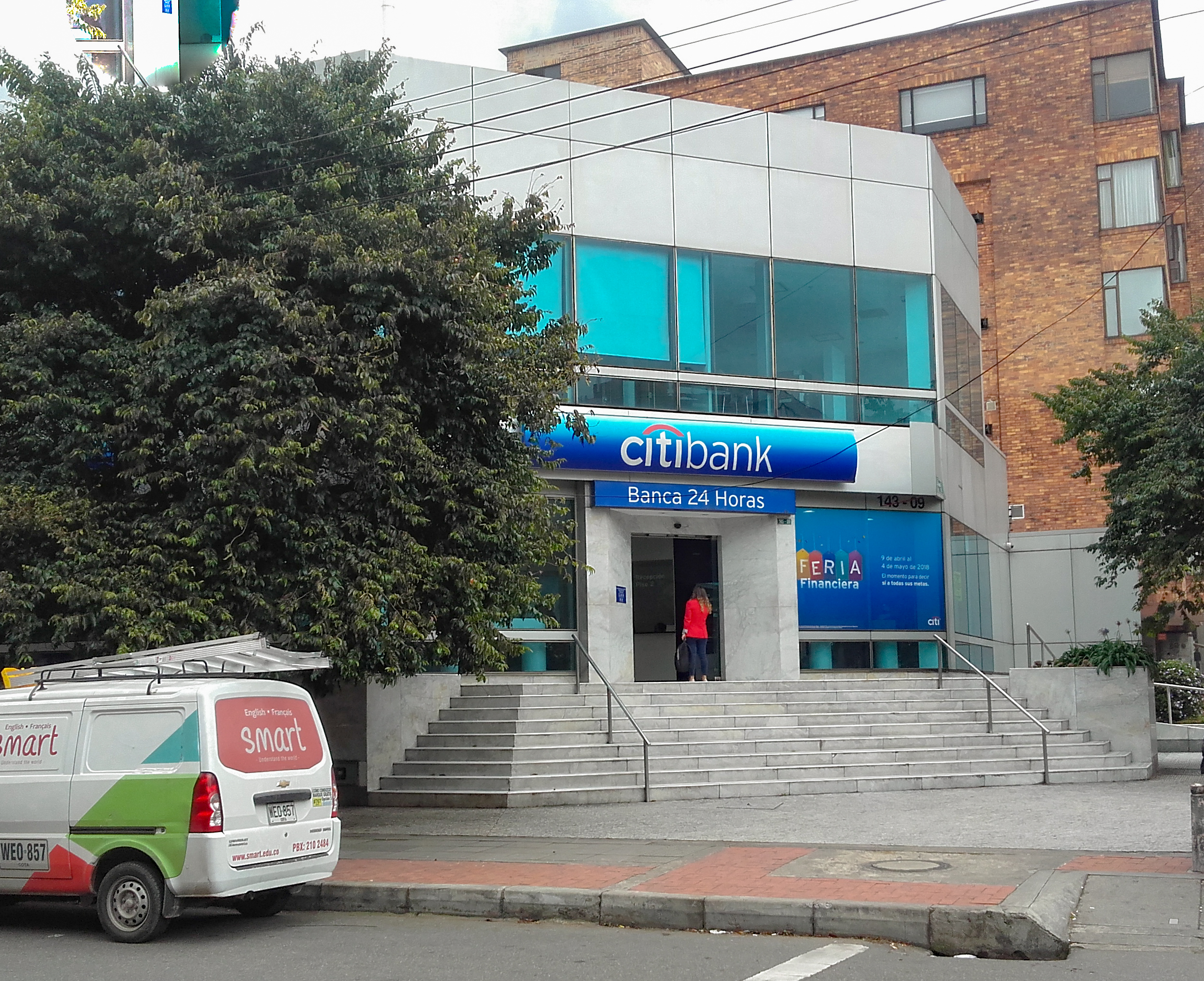 kskskwkwkwkwnsn